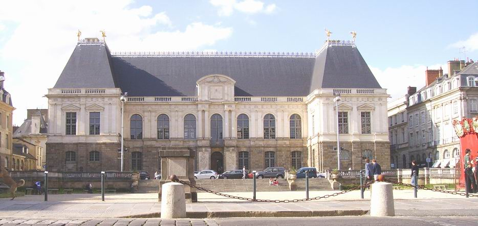 Palais du parlement de Bretagne situé à Rennes (Ille-et-Vilaine, France).